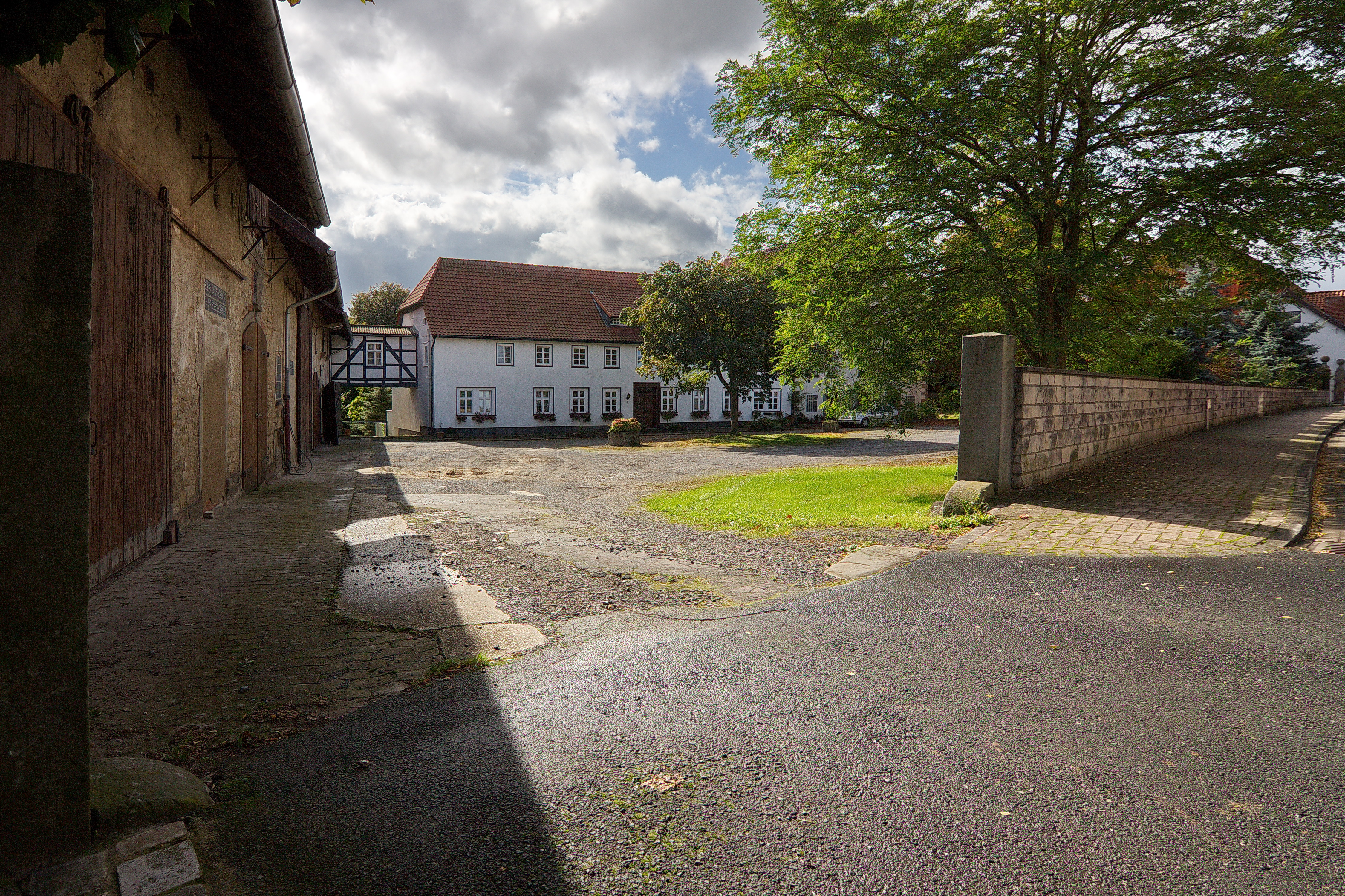 Der Paterhof gehörte wahrscheinlich zum Kloster Marienrode in Neuhof/Hildesheimer Wald/Marienrode bei Hildesheim. Im Dreißigjährigen Krieg wurde das Gut zerstört. Das Wohnhaus wurde in der ersten Hälfte des 18. Jahrhunderts erbaut, die anderen Gebäude entstanden im 19. Jahrhundert.